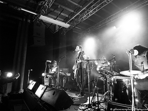 Karkwa en concert à la salle de concert Les Trinitaires, à Metz